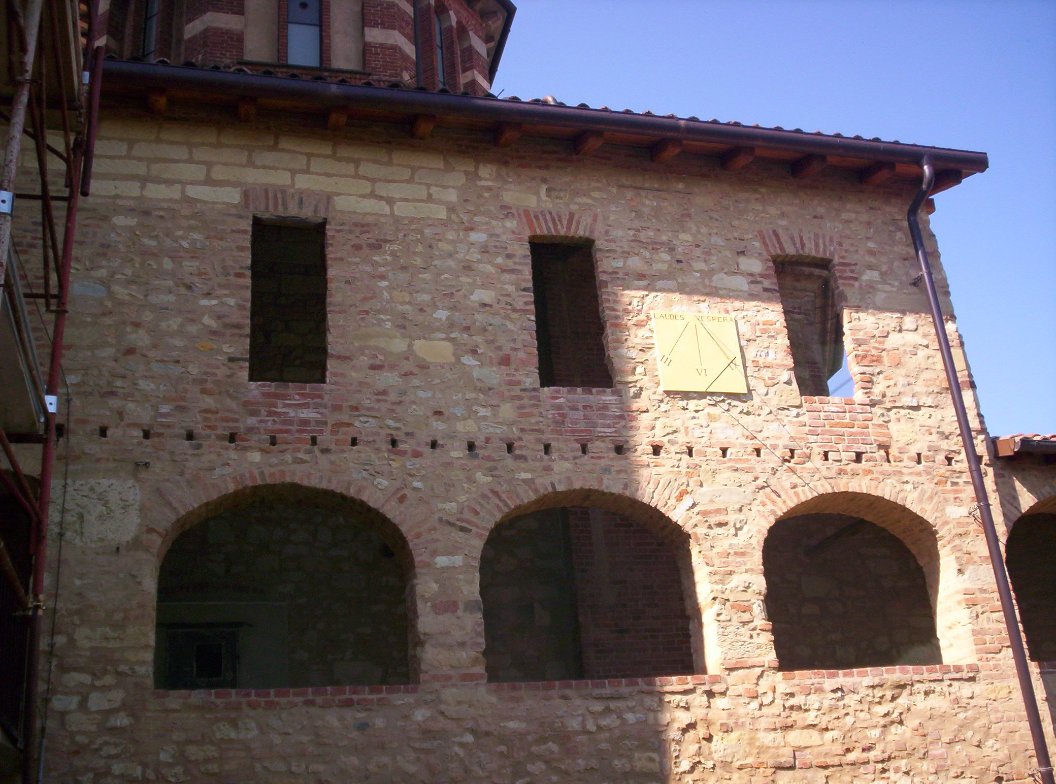 Facciata del chiostro benedettino risalente al XVI secondo